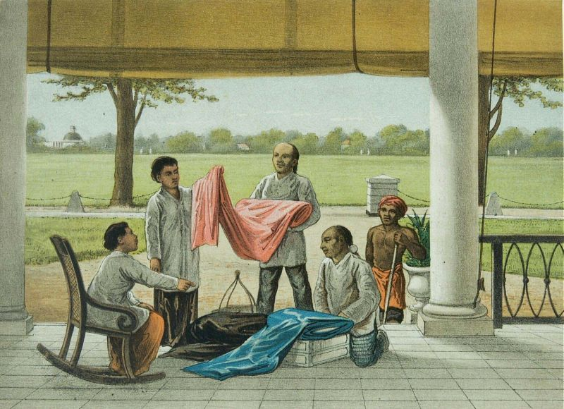 Litho. Litho naar een oorspronkelijke aquarel van Rappard. Een Chinees die stof ter verkoop aanbied